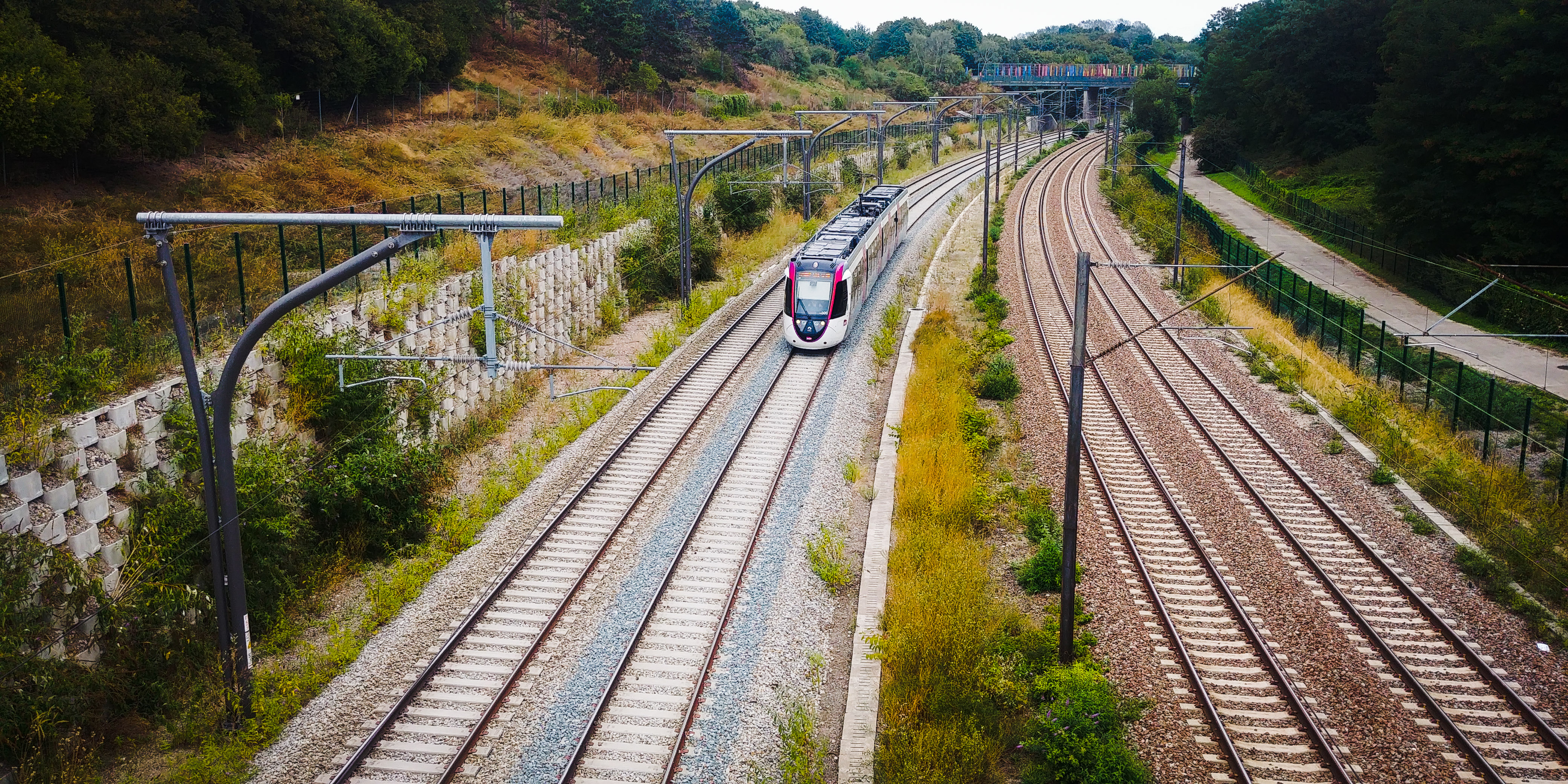 Tramway T11 dans le parc Georges Valbon : Les deux voies de gauche sont celles de la ligne 11 Express du tramway d'Île-de-France sur lesquelles circule un élément Alstom Citadis Dualis, et, à droite, les deux voies de la ligne de la grande ceinture de Paris.